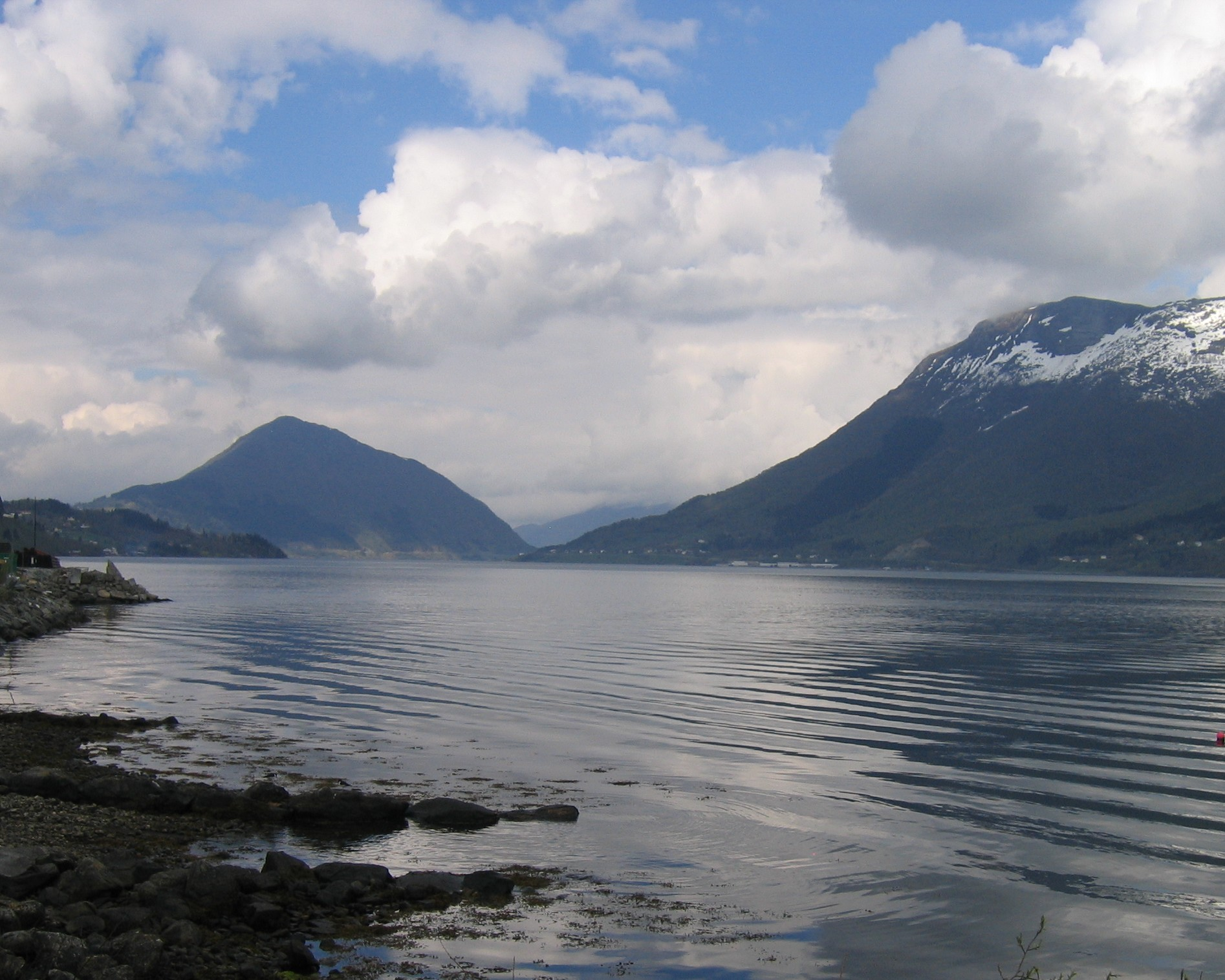 Ørstafjorden, Ørsta, Møre og Romsdal,Norway